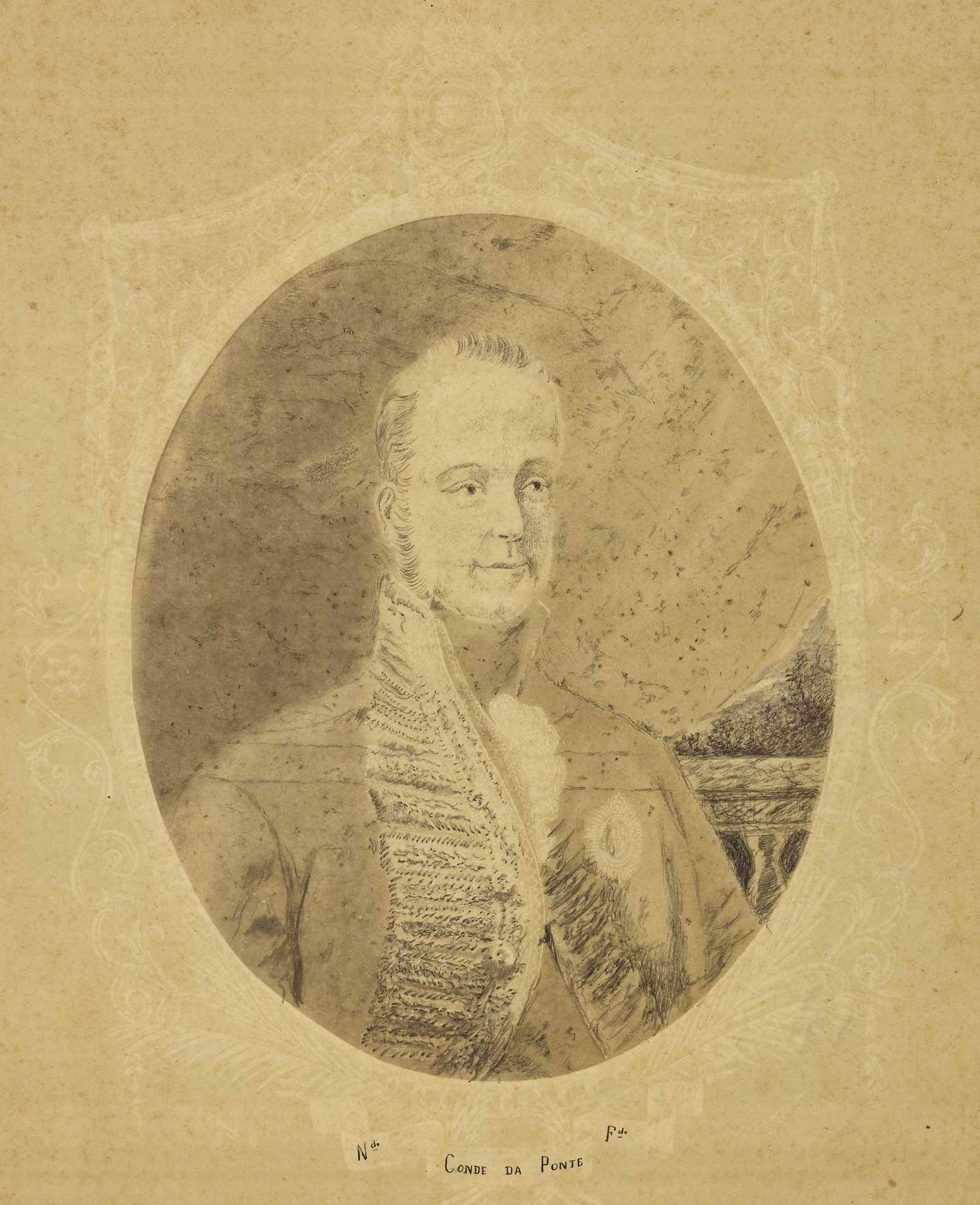 João de Saldanha da Gama Melo Torres Guedes Brito, conde da ponte